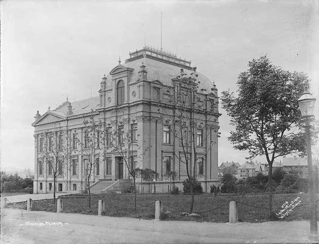 Stavanger Museum in Stavanger, Norway.